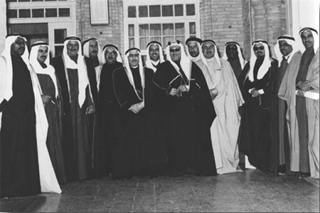 التشكيل الوزاري الأوّل في دولة الكويت. في العام: 1962. The first cabinet in the history of Kuwait (1962).